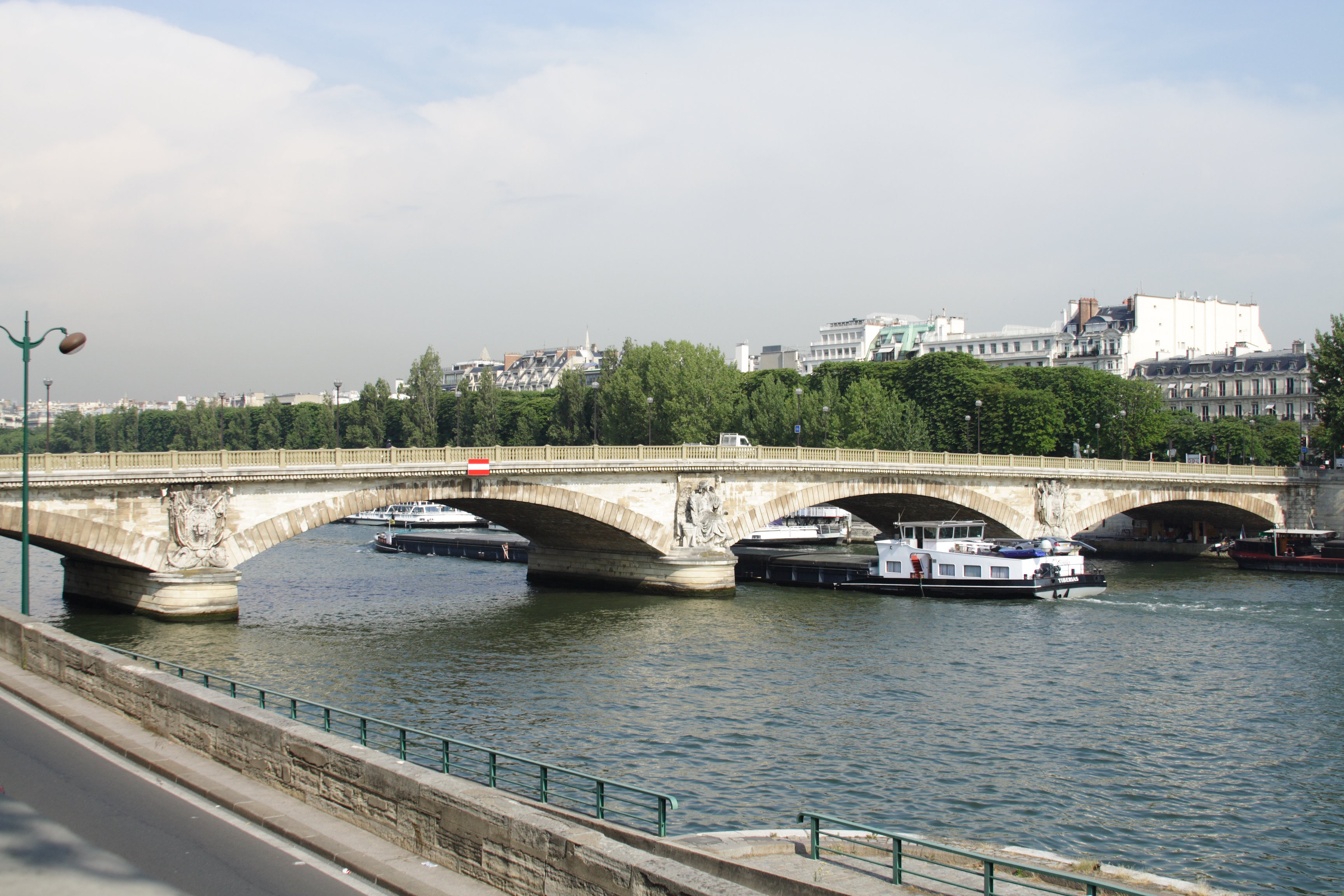 Pont des Invalides(Paris, France)